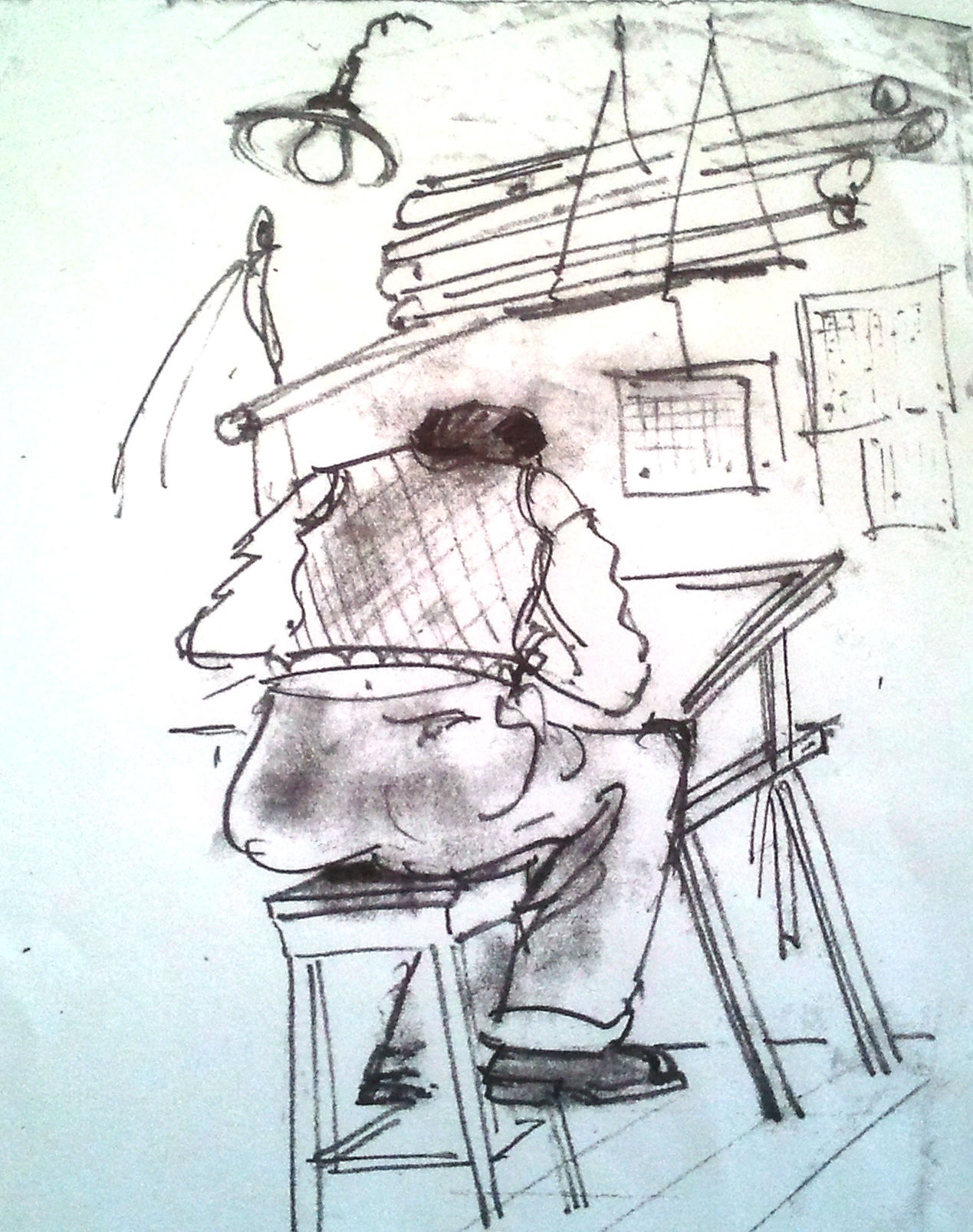 רישום מ-1942 המציג את אדריכל אשר גליברמן רוכן על שולחן השרטוט